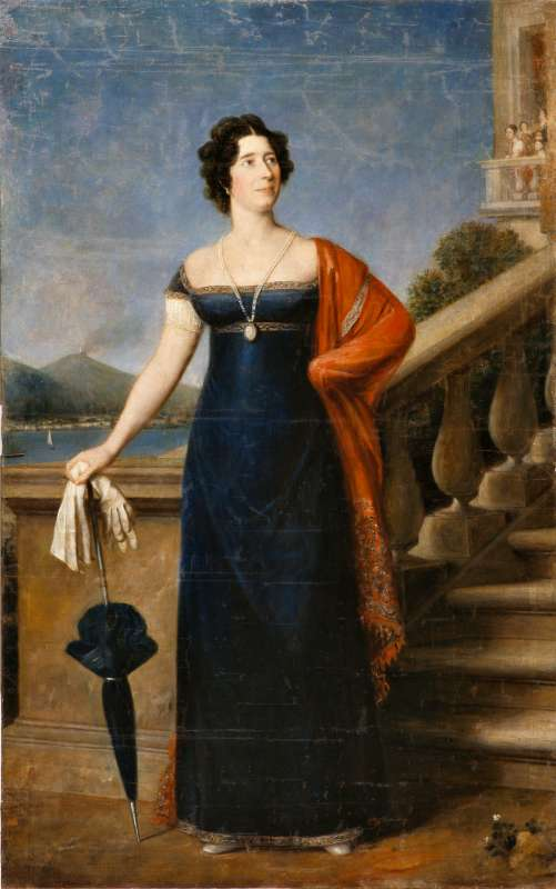 Беларуская (тарашкевіца): Партрэт Марыі дэ Нэры, жонкі Міхала Клеафаса Агінскага